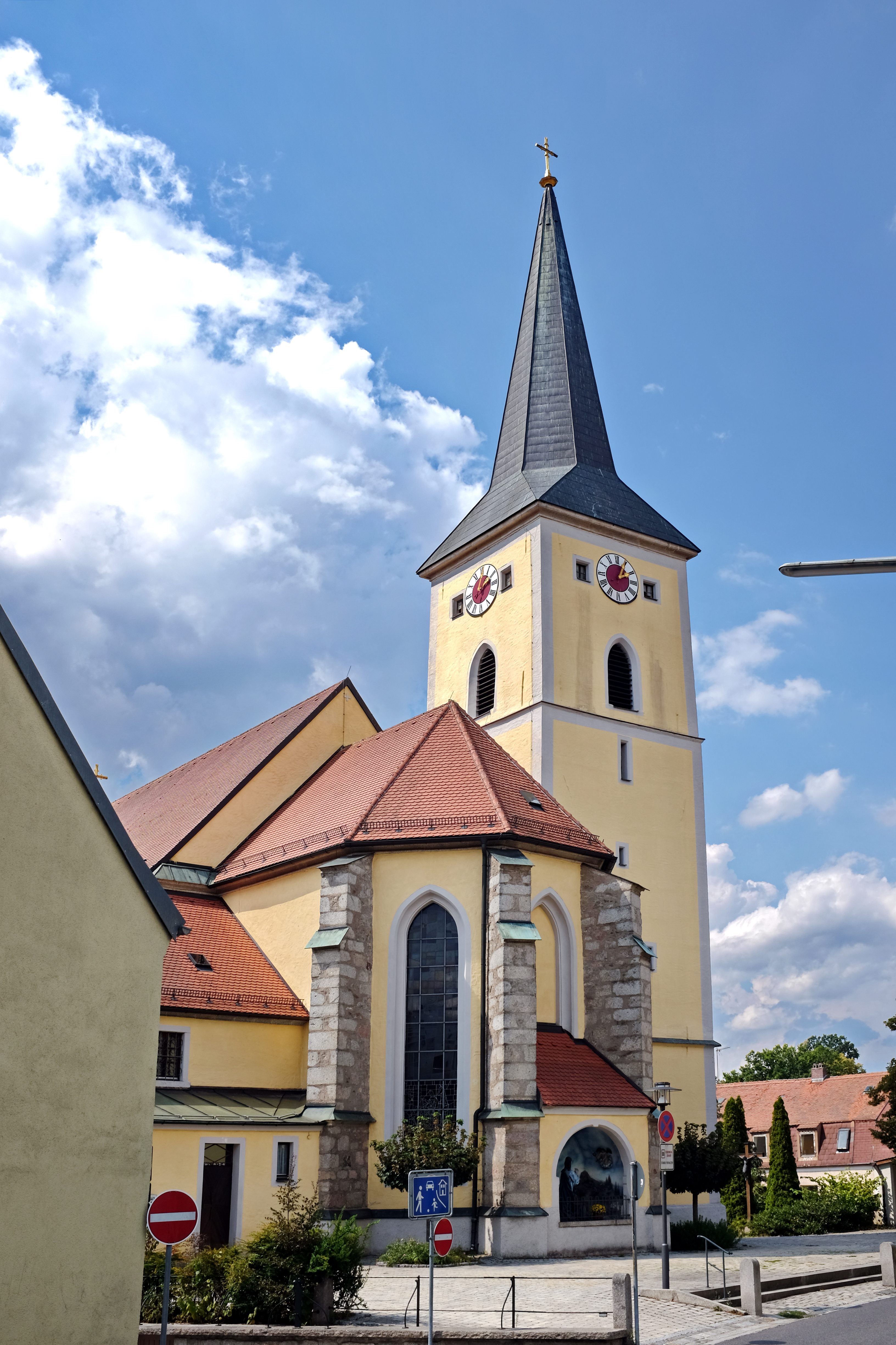 Windischeschenbach, kostel sv. Jimrama